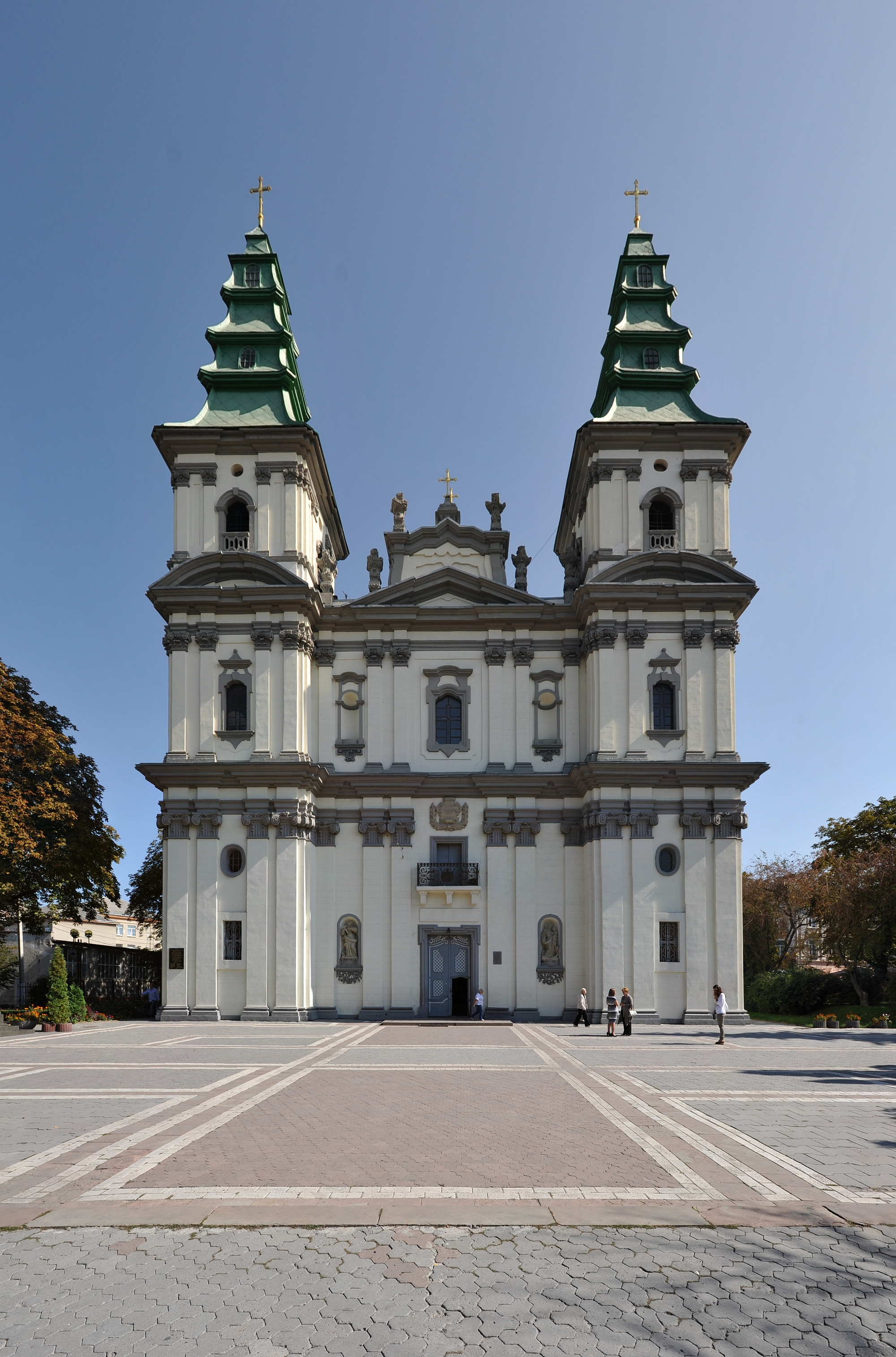 Костел Монастиря Домініканів